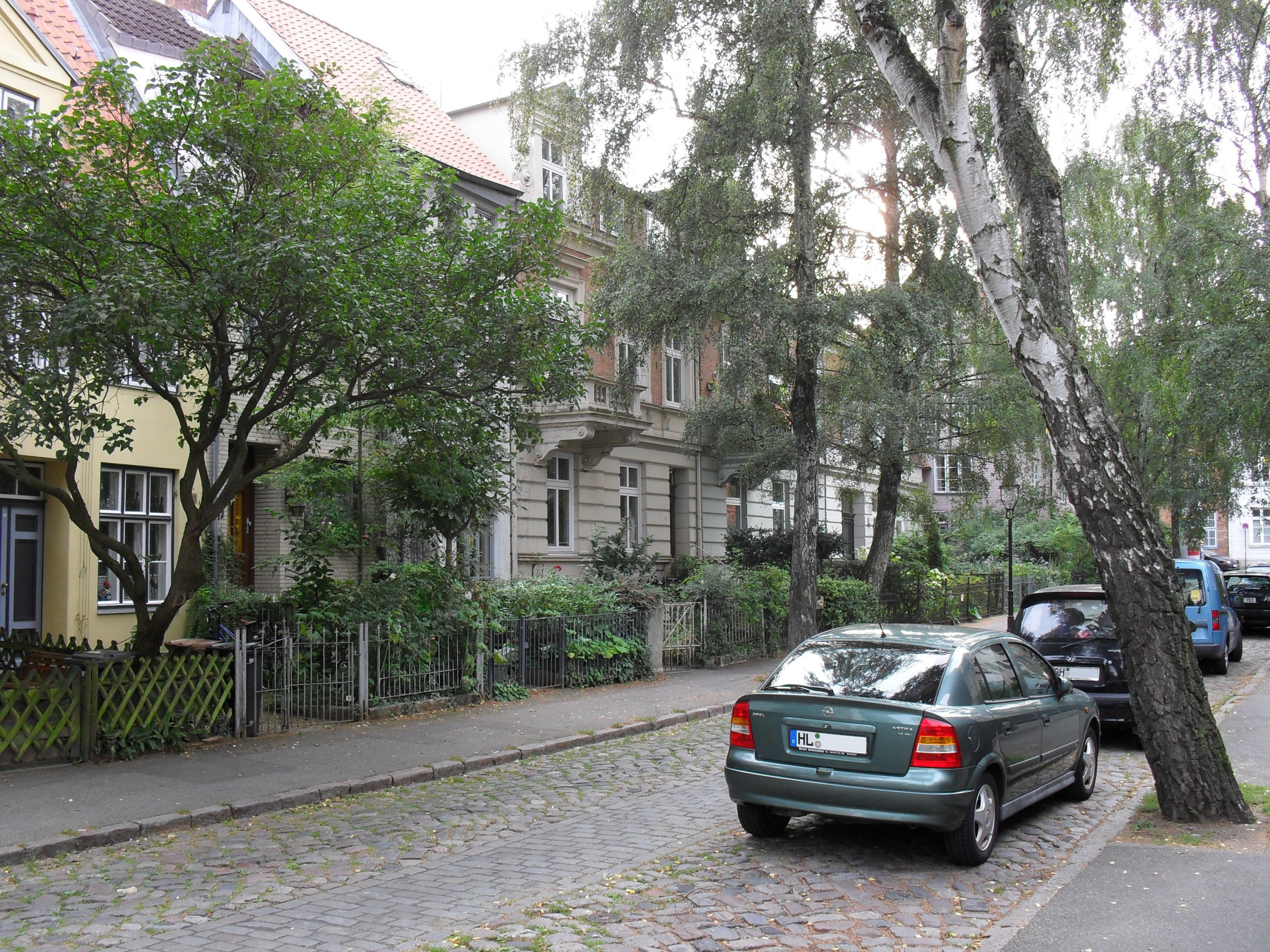 Der Weite Lohberg in Lübeck